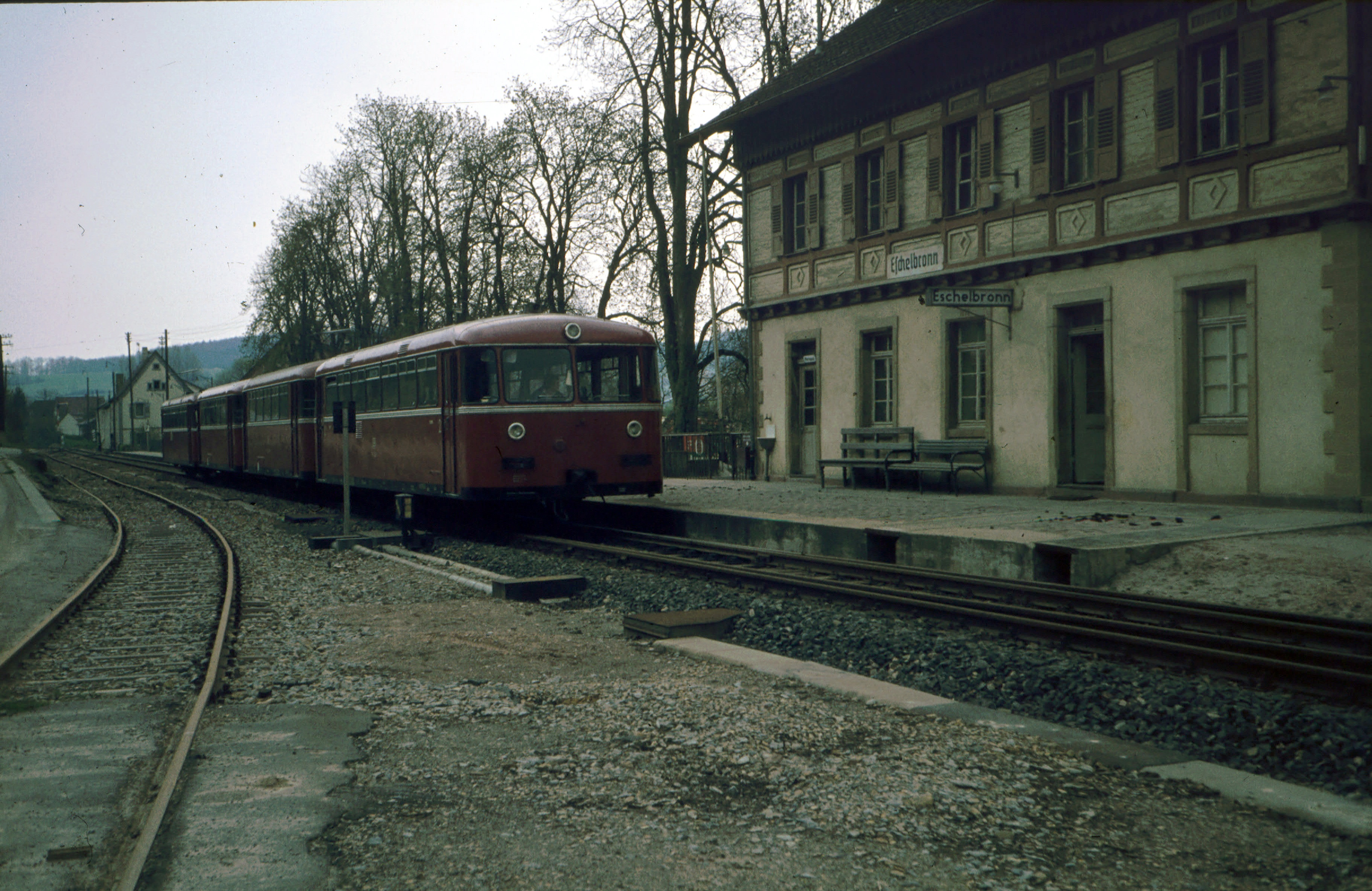 Bahnhof Eschelbronn im April 1978